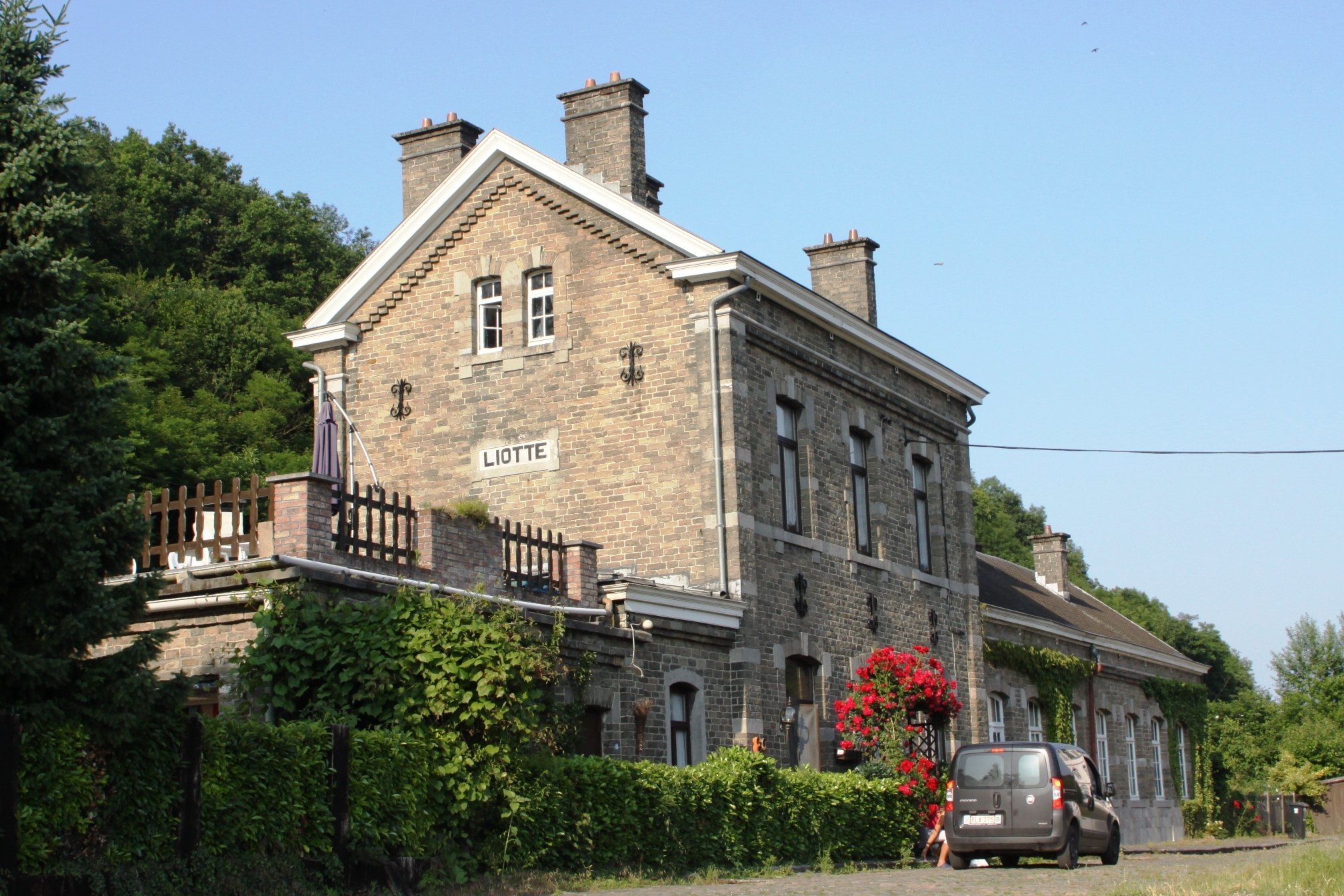 D'Gare vu Liotte (2010).